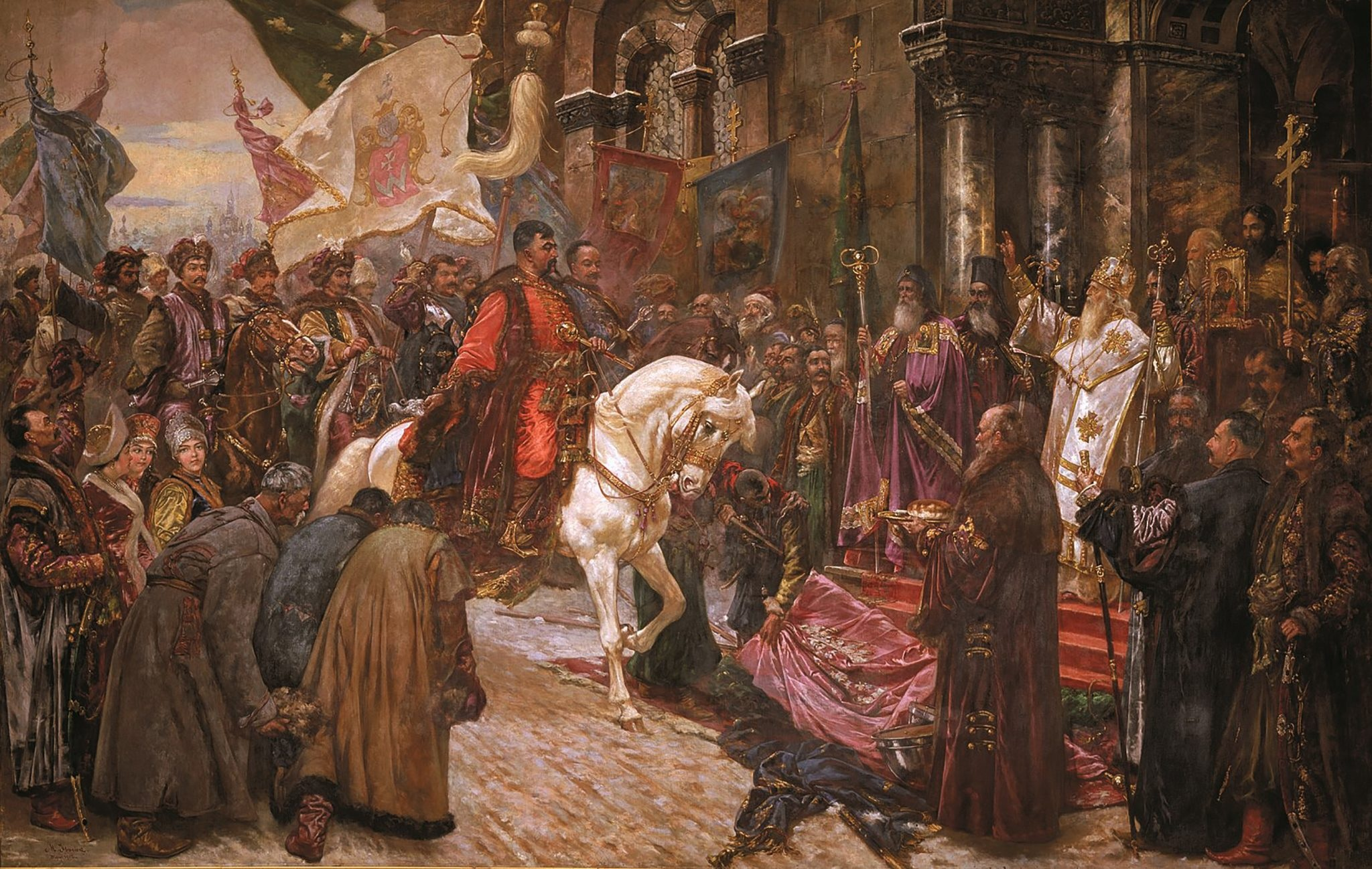 Bohdan Khmelnytsky Entering Kyiv.